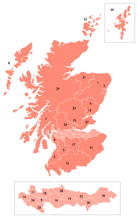 Нохчийн: Шотландин карта